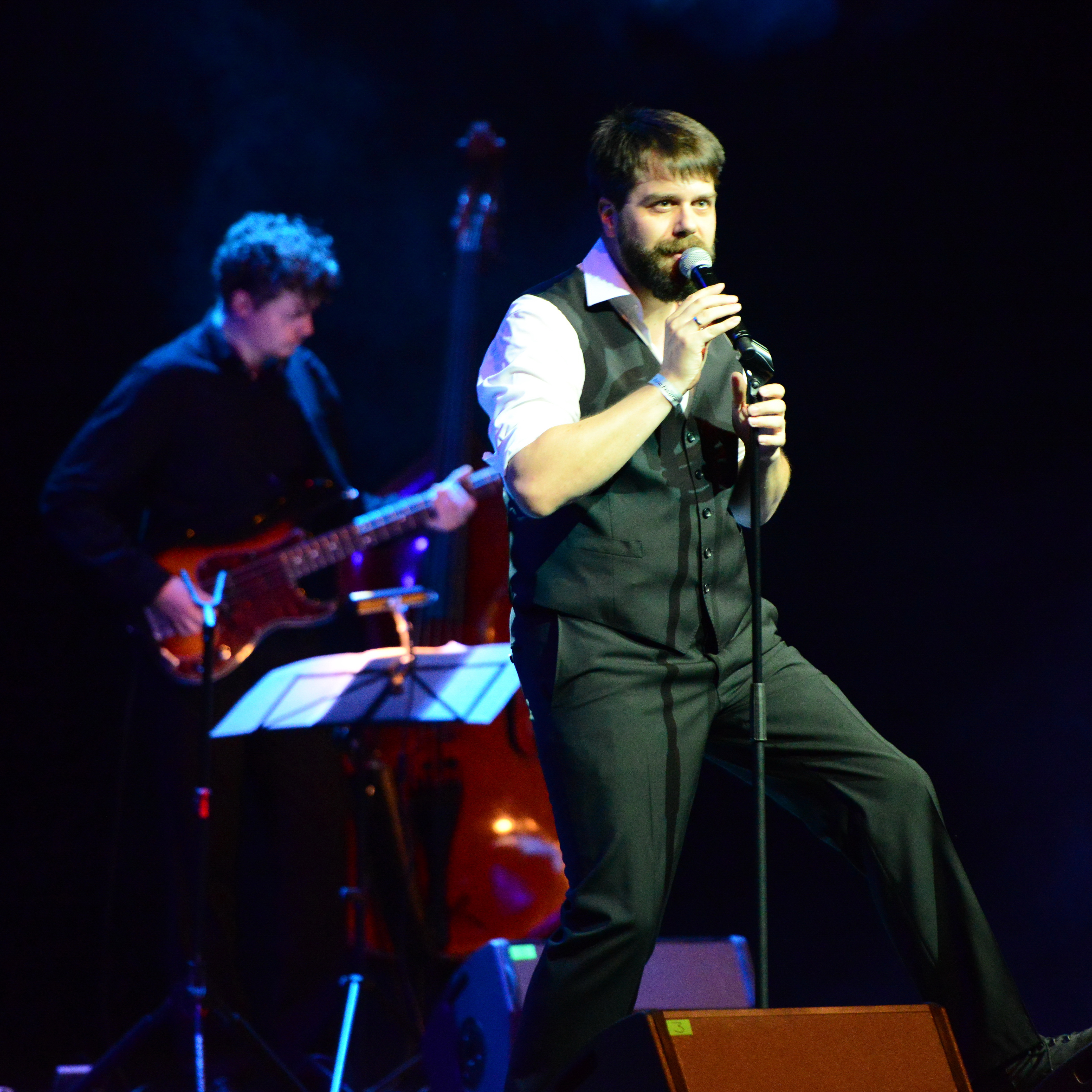 Janus, Amphi festival 2014